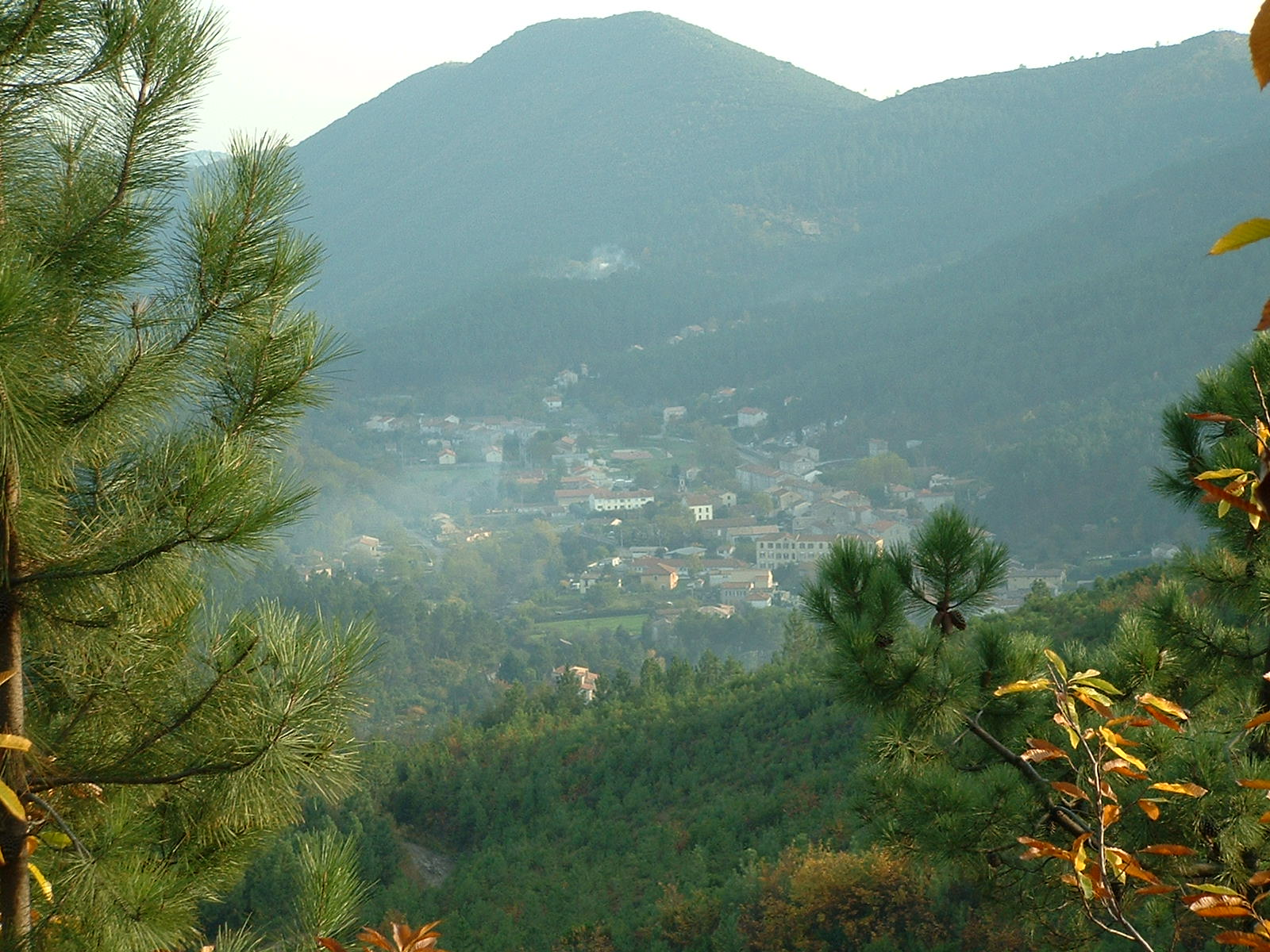 Le Martinet Image personnelle Kerleon